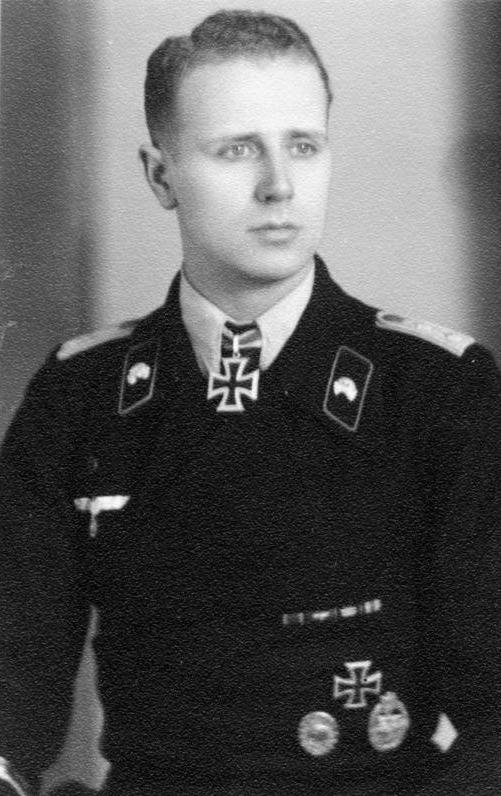 Hptm. Josef Rettemeier, Kdr. Pz. Abt. 5 Nr. 2302 R. K. verl. 5.12.1943